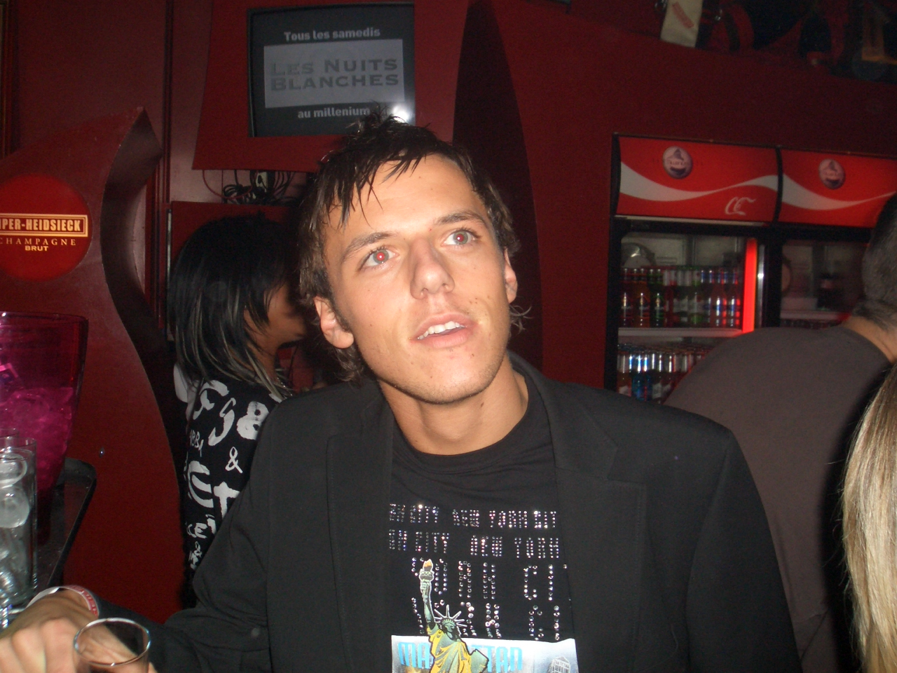 Soirée au Millenium avec Anthony,Allesandro,Mouloud